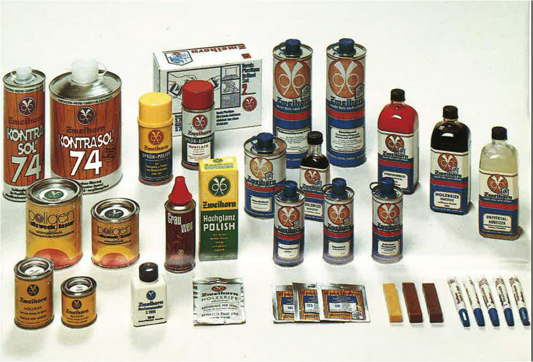 Produktsortiment der Marke Zweihorn in den 80ern